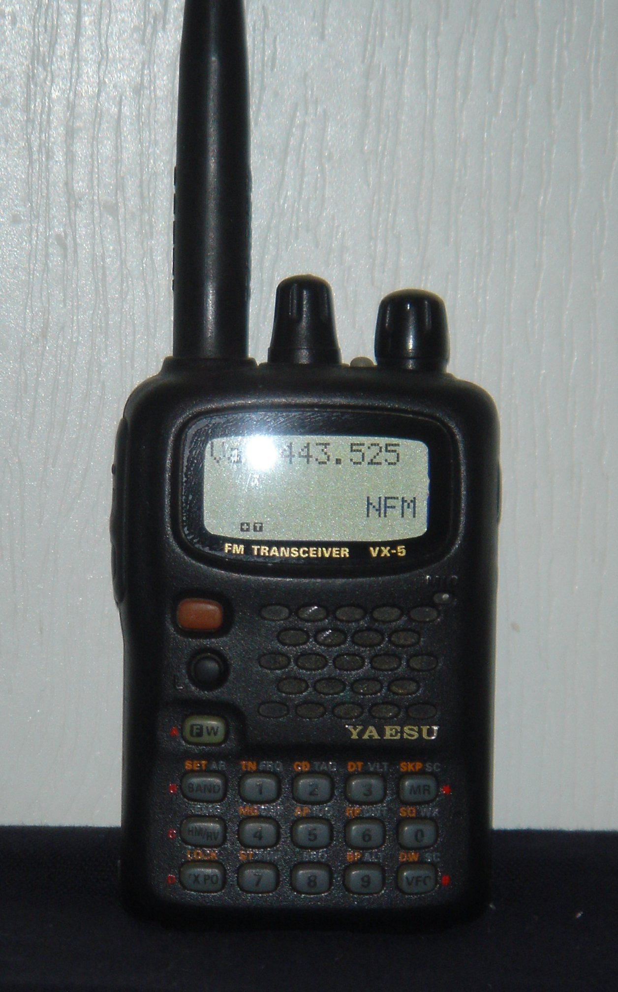 Yaesu VX-5R Tri-band Handheld